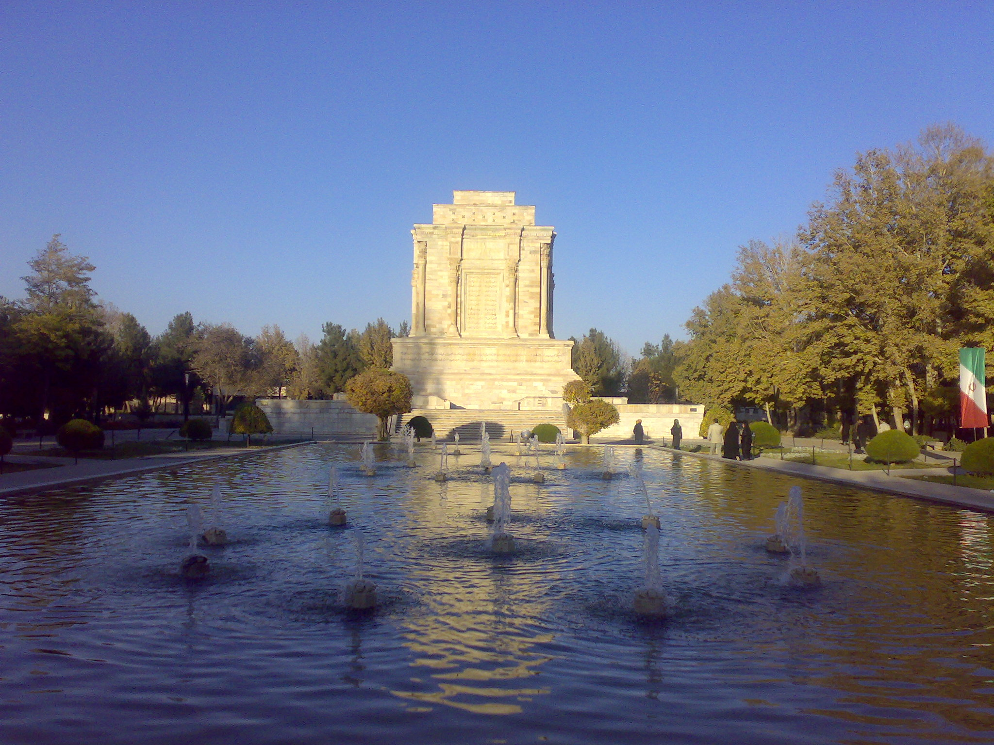 Ferdowsi tomb in tus